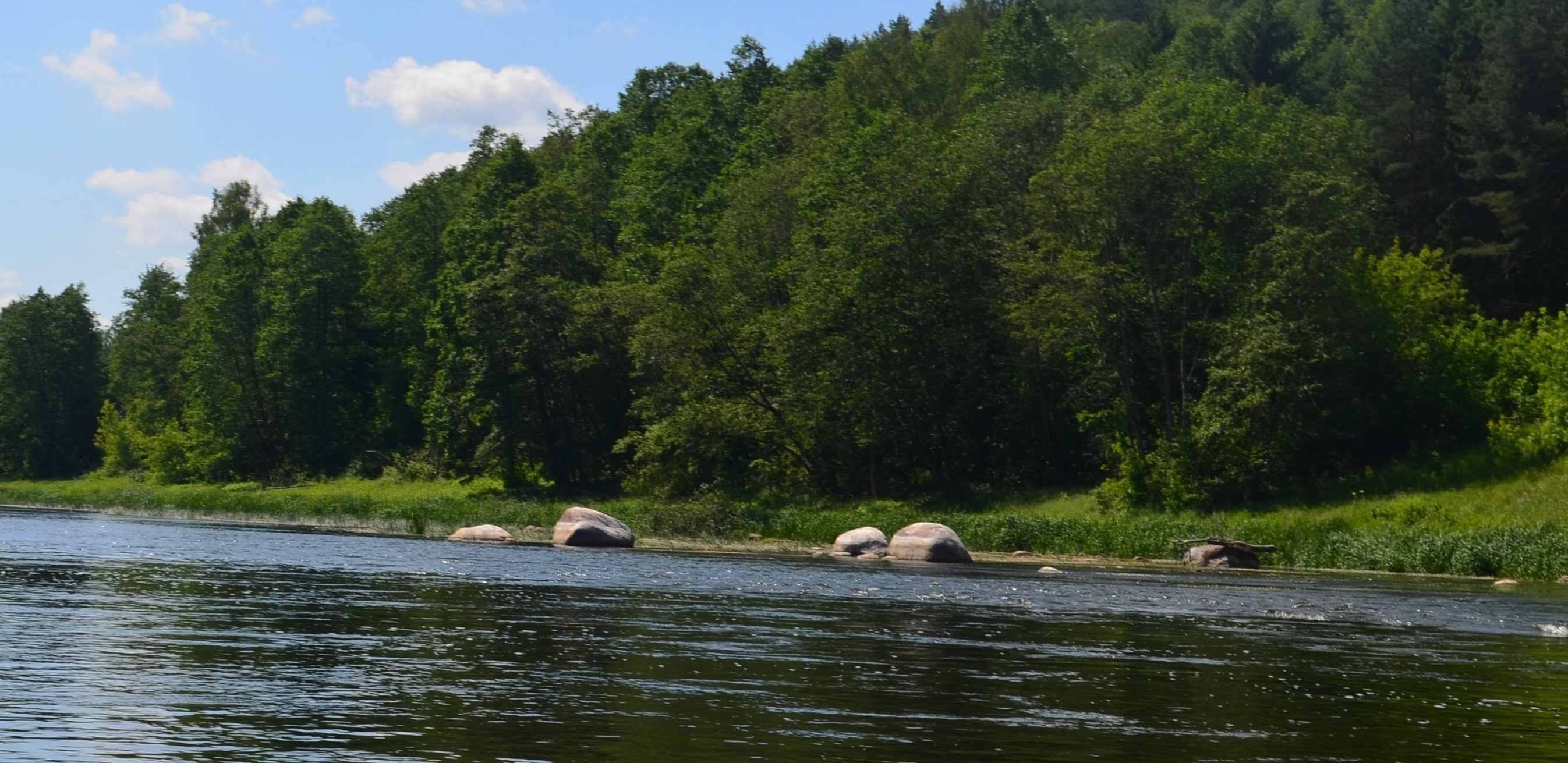 Verkšionių akmenys „Užkeikta veselia“, Neris, šalia Molynės (Vilniaus r.)